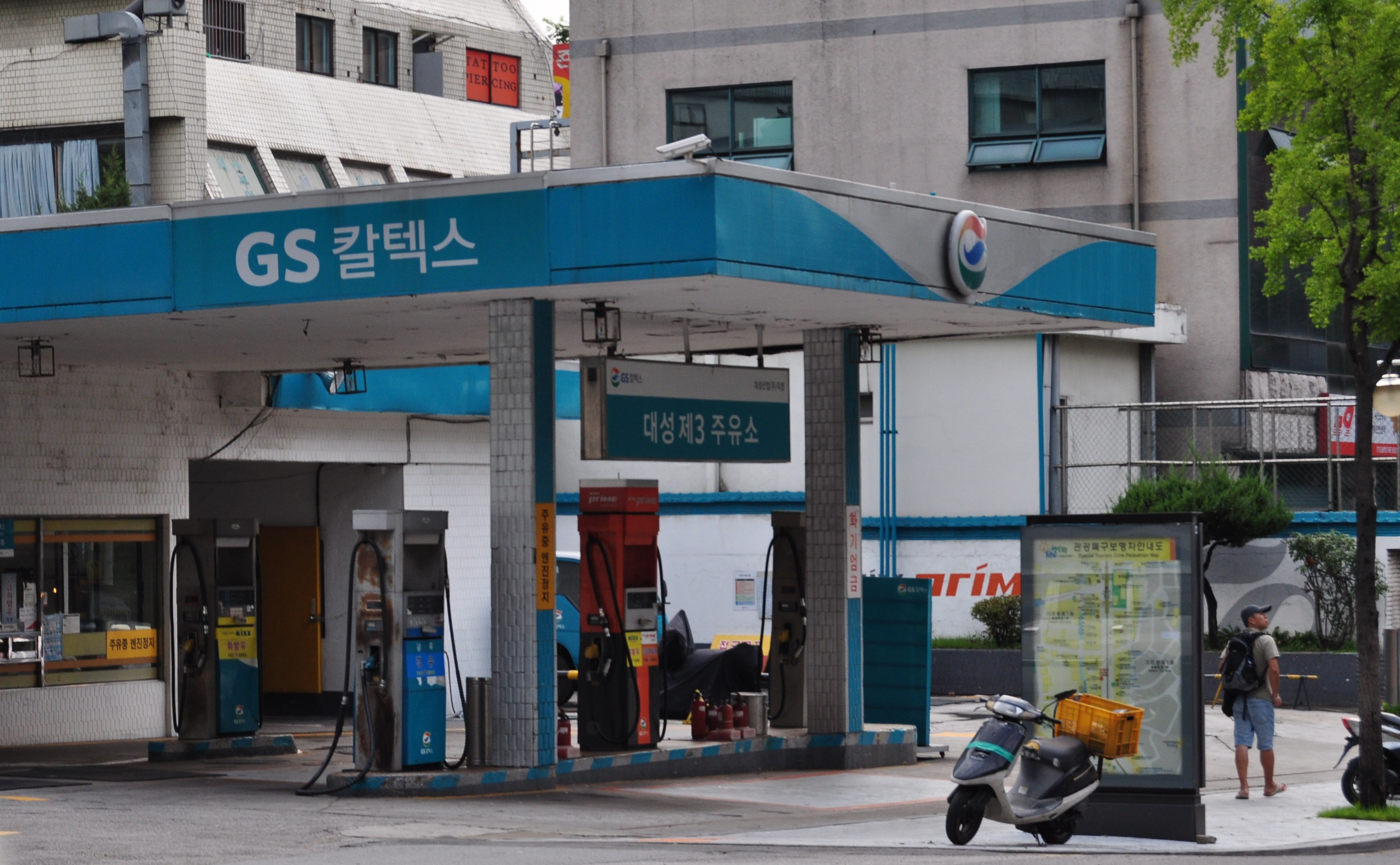 GS칼텍스 주유소. 이태원 소재